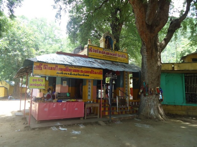 பெரியண்ணசாமி கோயில் முகப்பு கல்லாத்துகோம்பை